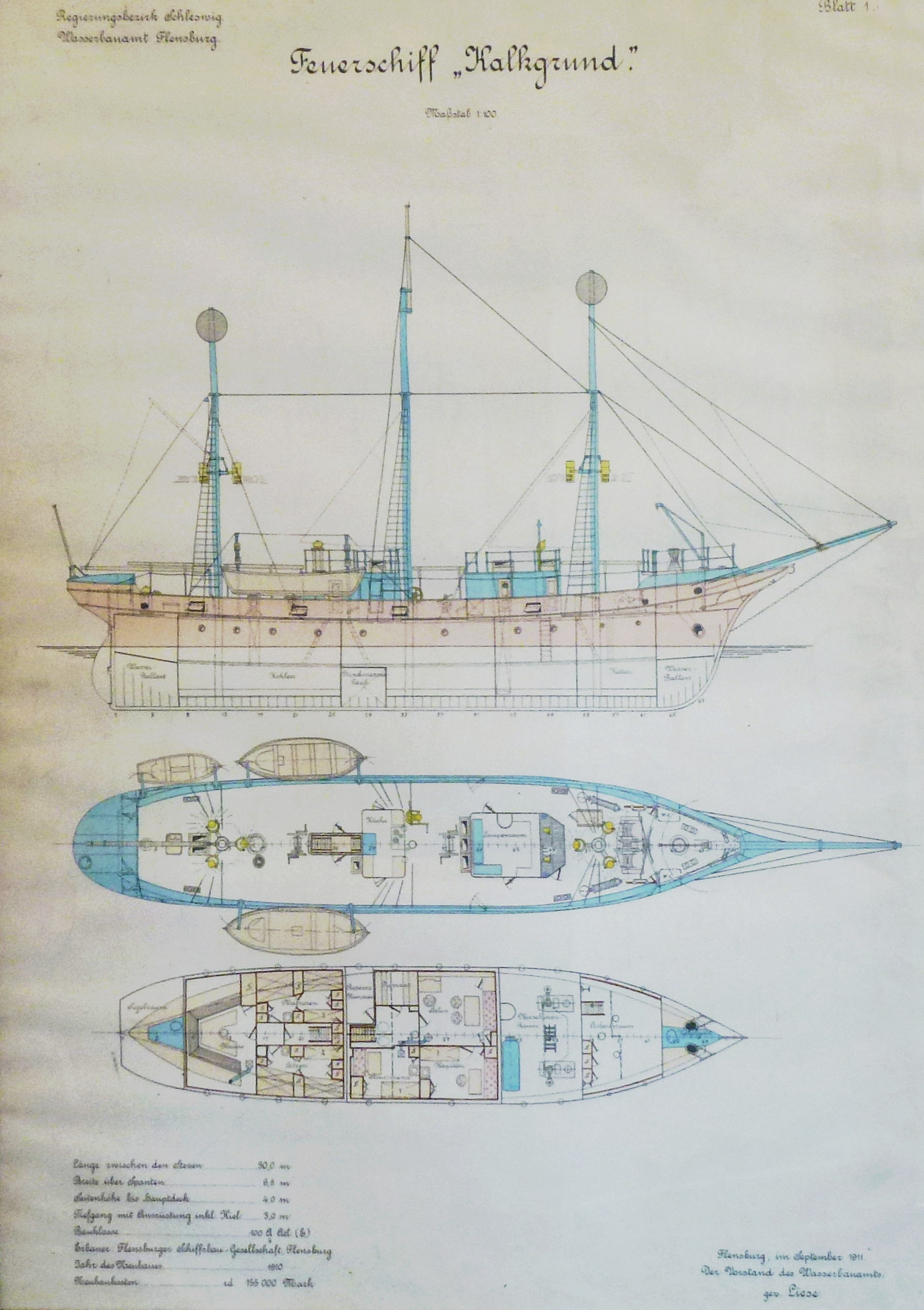 Feuerschiff Kalkgrund Zeichnung 1911 im Leuchtturm Travemünde